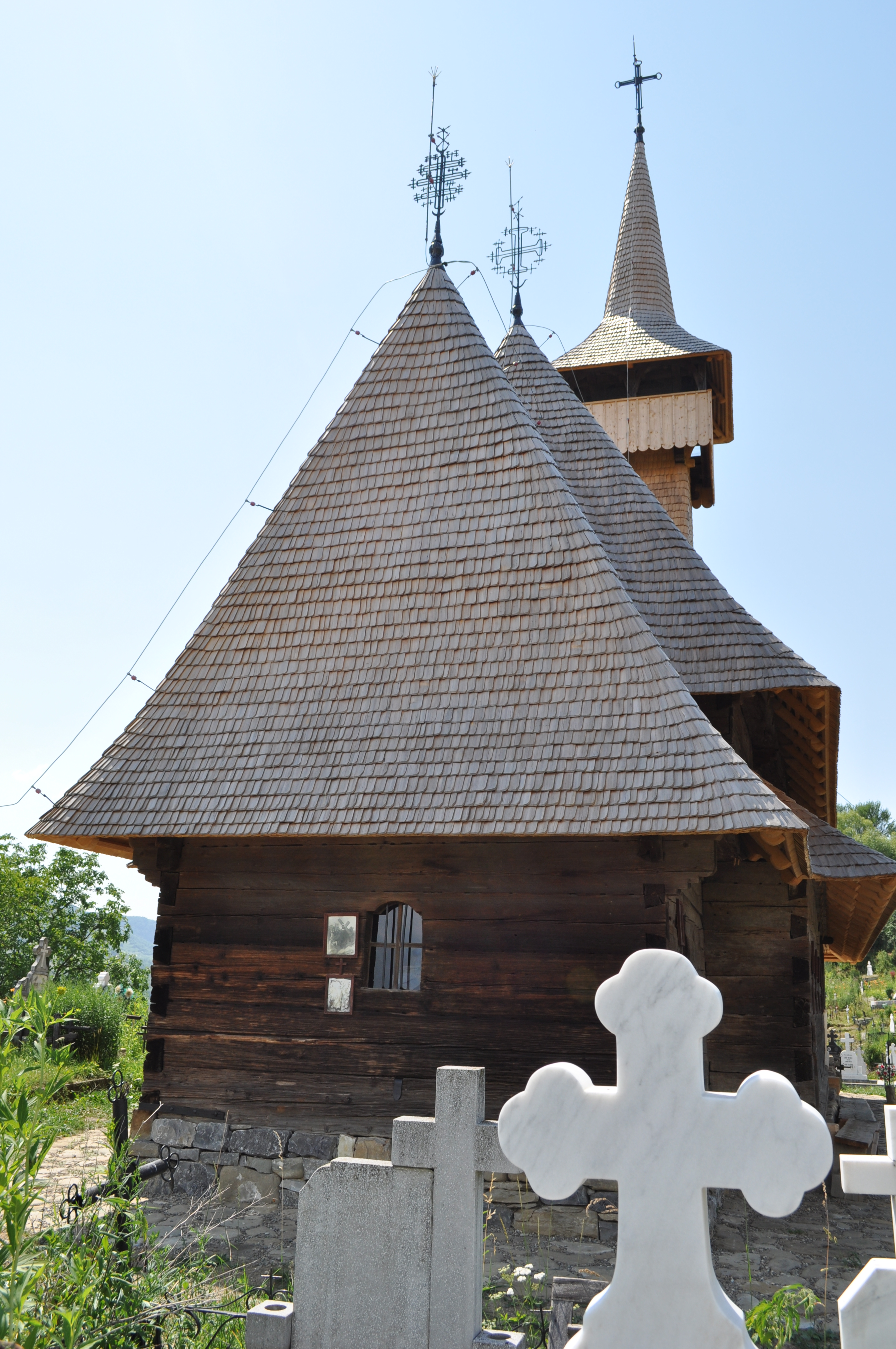 Biserica de lemn "Sfântul Nicolae" (a Nistoreştilor) , oraş SĂLIŞTEA DE SUS